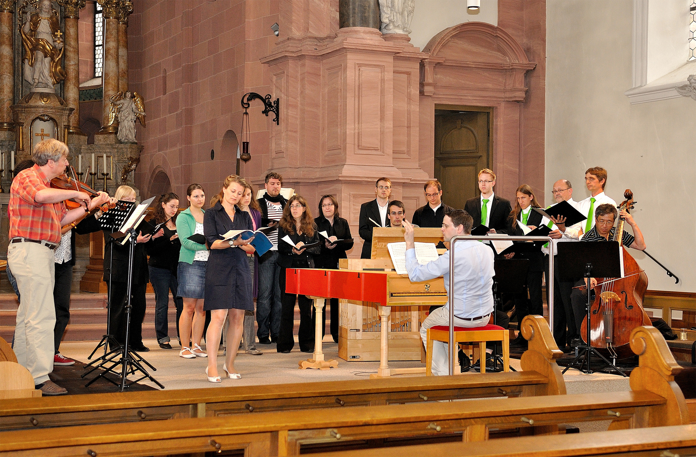 Ensemble Paulinum